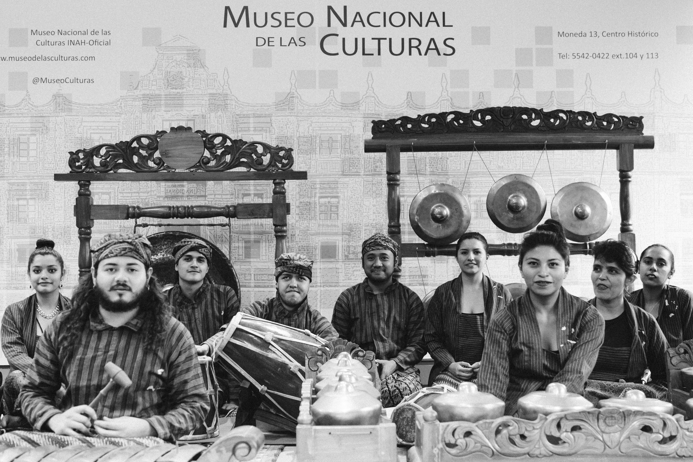 conjunto gamelan barudak del grupo Indra Swara Mexico